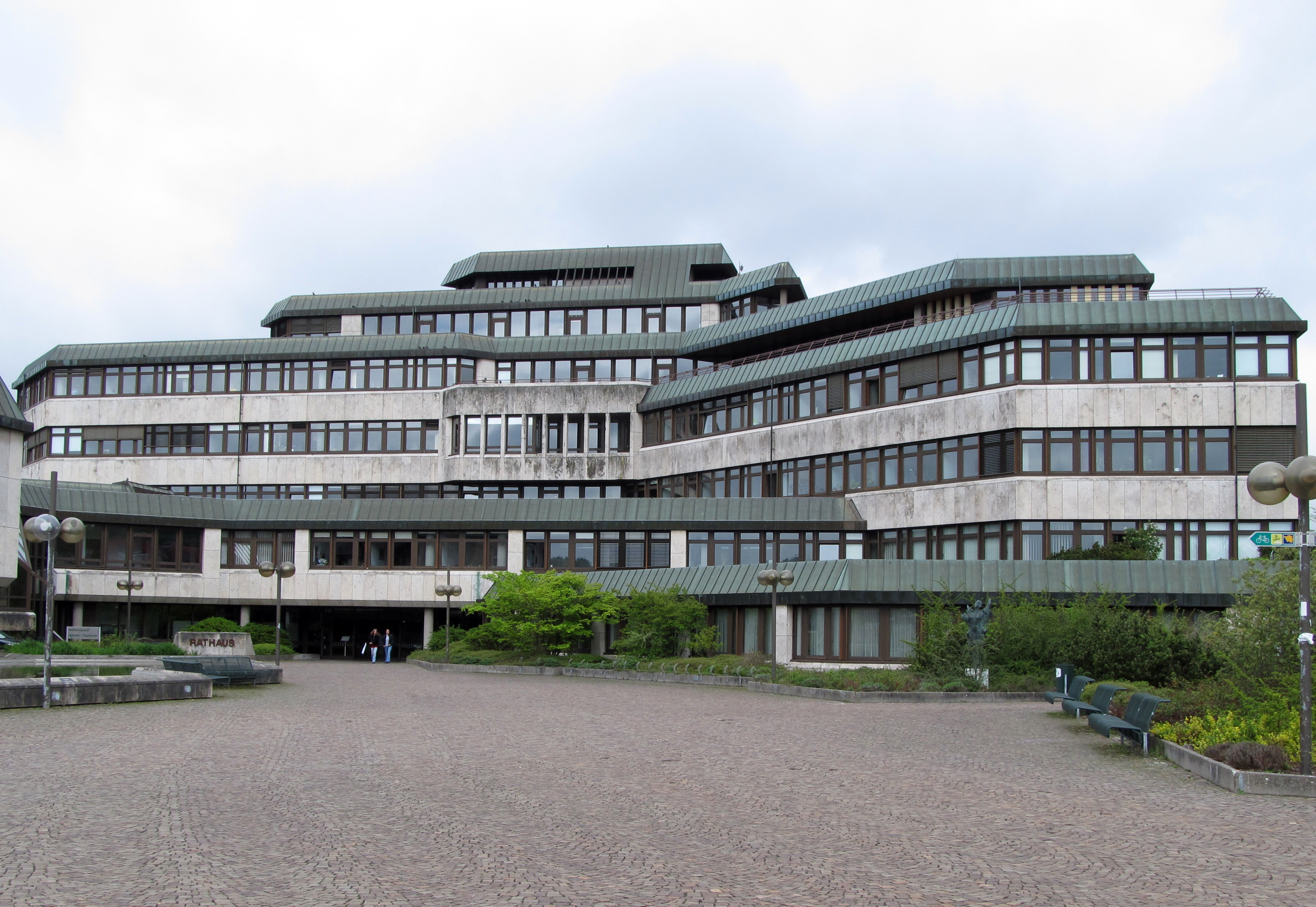 Das Homburger Rathaus